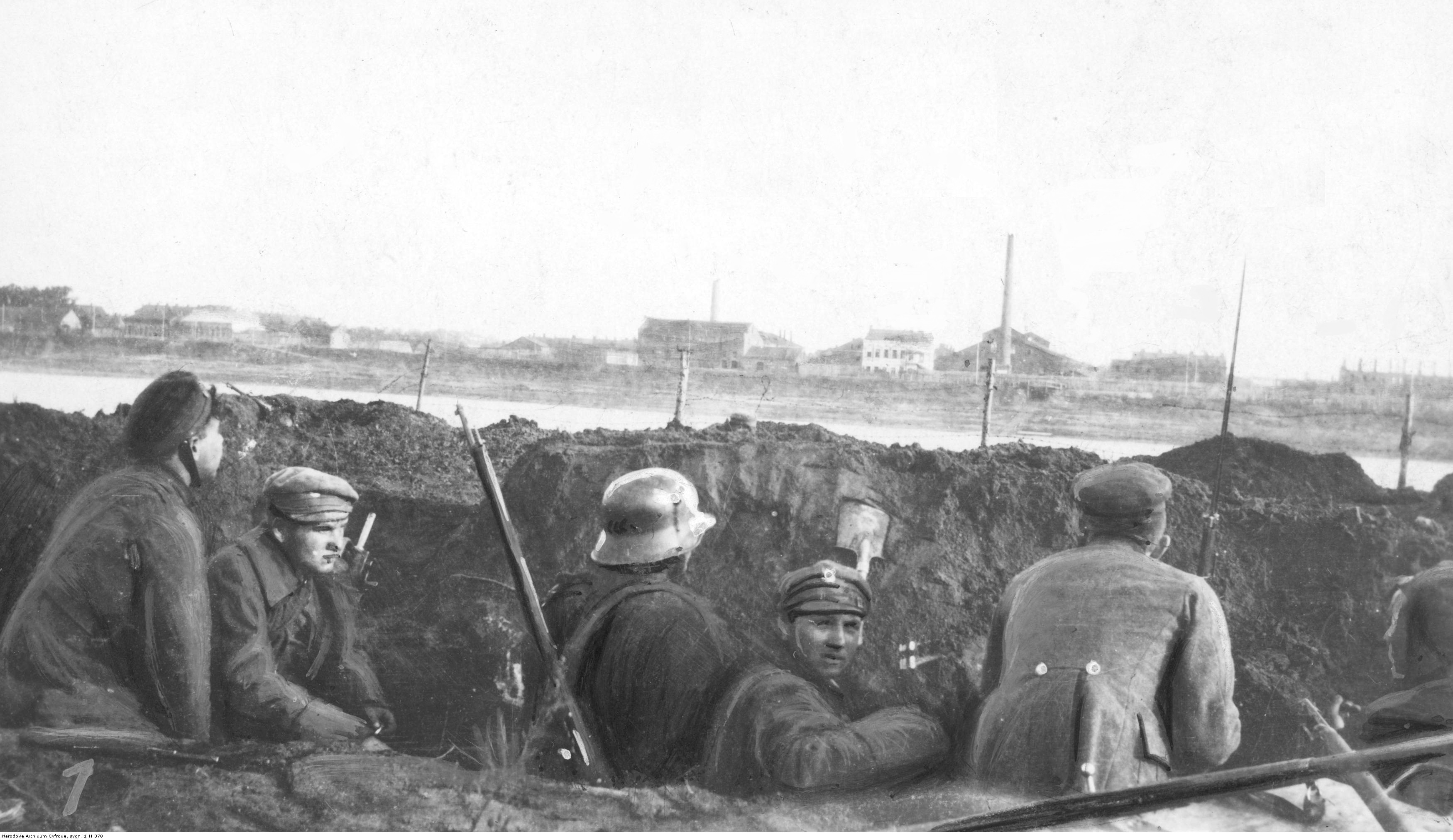 Wojna polsko-sowiecka. Przyczółek mostowy w Dźwińsku - żołnierze w okopie; październik 1919. Koncern Ilustrowany Kurier Codzienny - Archiwum Ilustracji. Sygnatura: 1-H-370